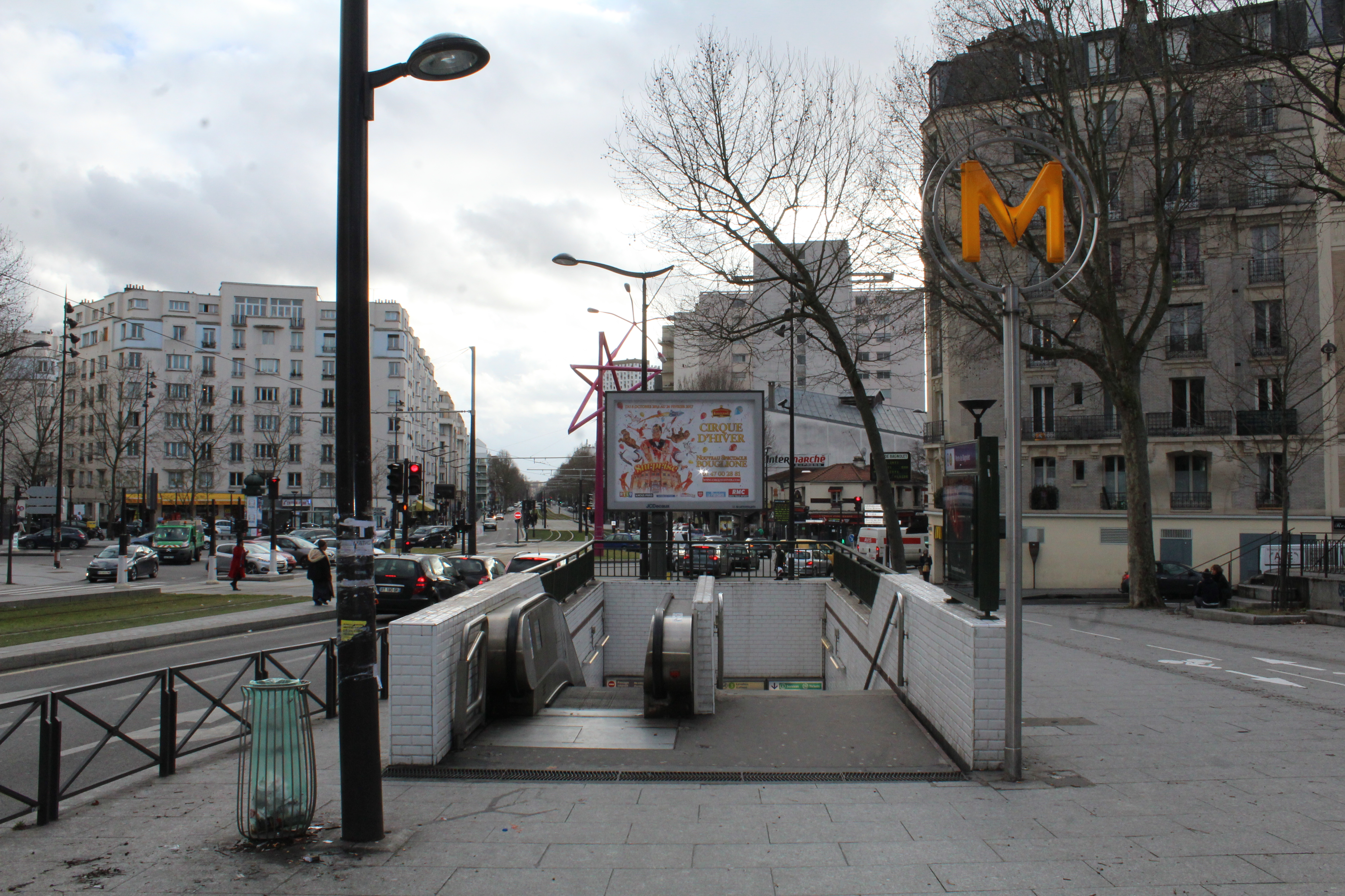 Entrée de la station de métro Porte de Bagnolet à Paris.